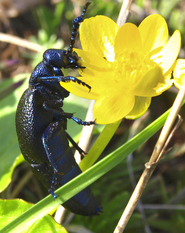 Калмицький яр. Квіти й жуки у яру